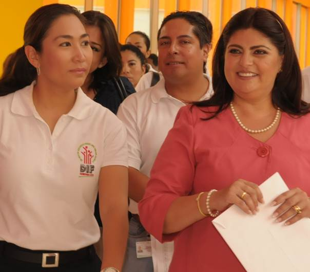 Liz Gamboa y Narcedalia Martin trabajando